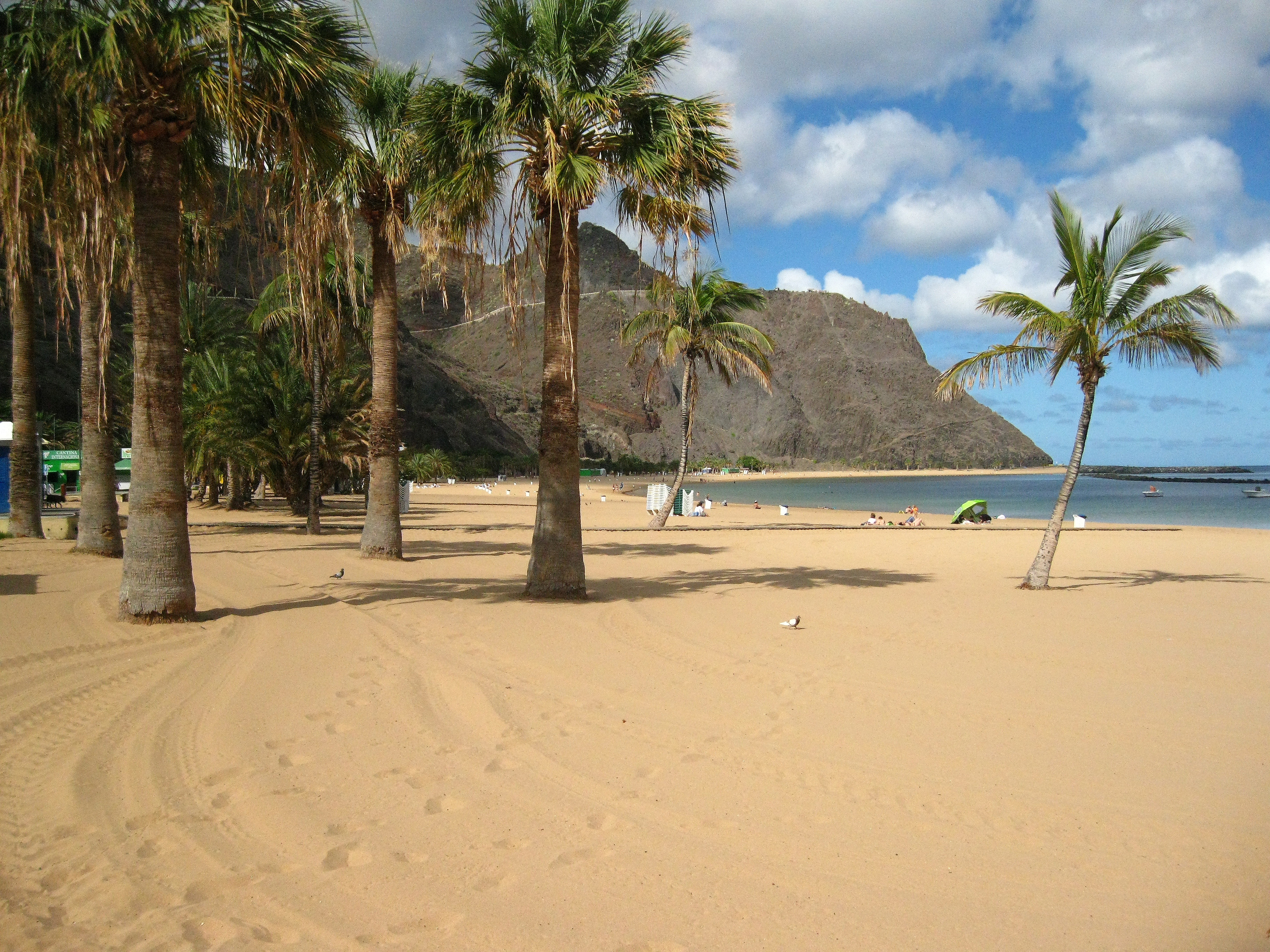 Teneriffa - Nordost - San Andrès - künstlich aufgeschütteter Strand mit Saharasand